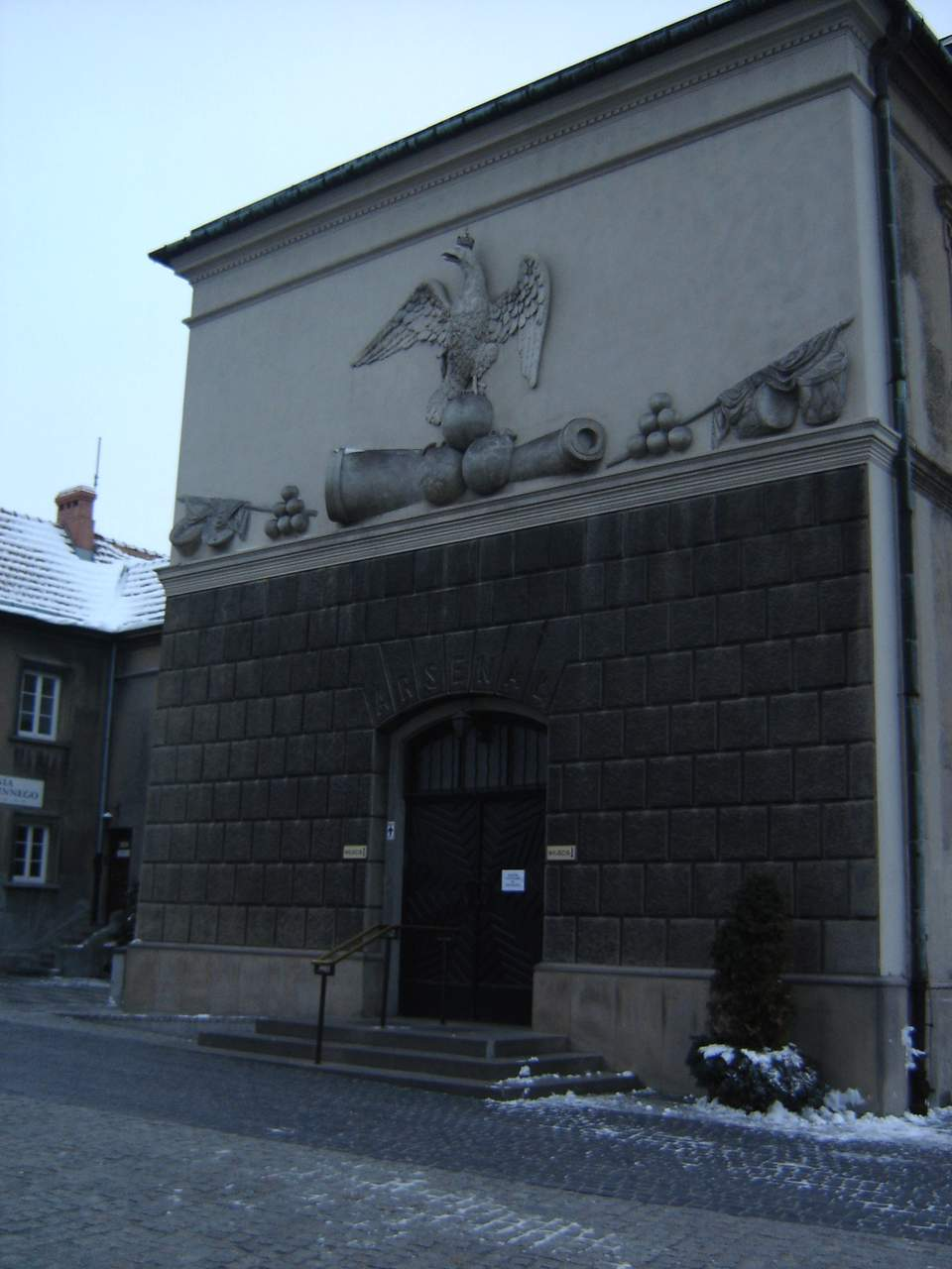 Częstochowa - Arsenał na Jasnej Górze